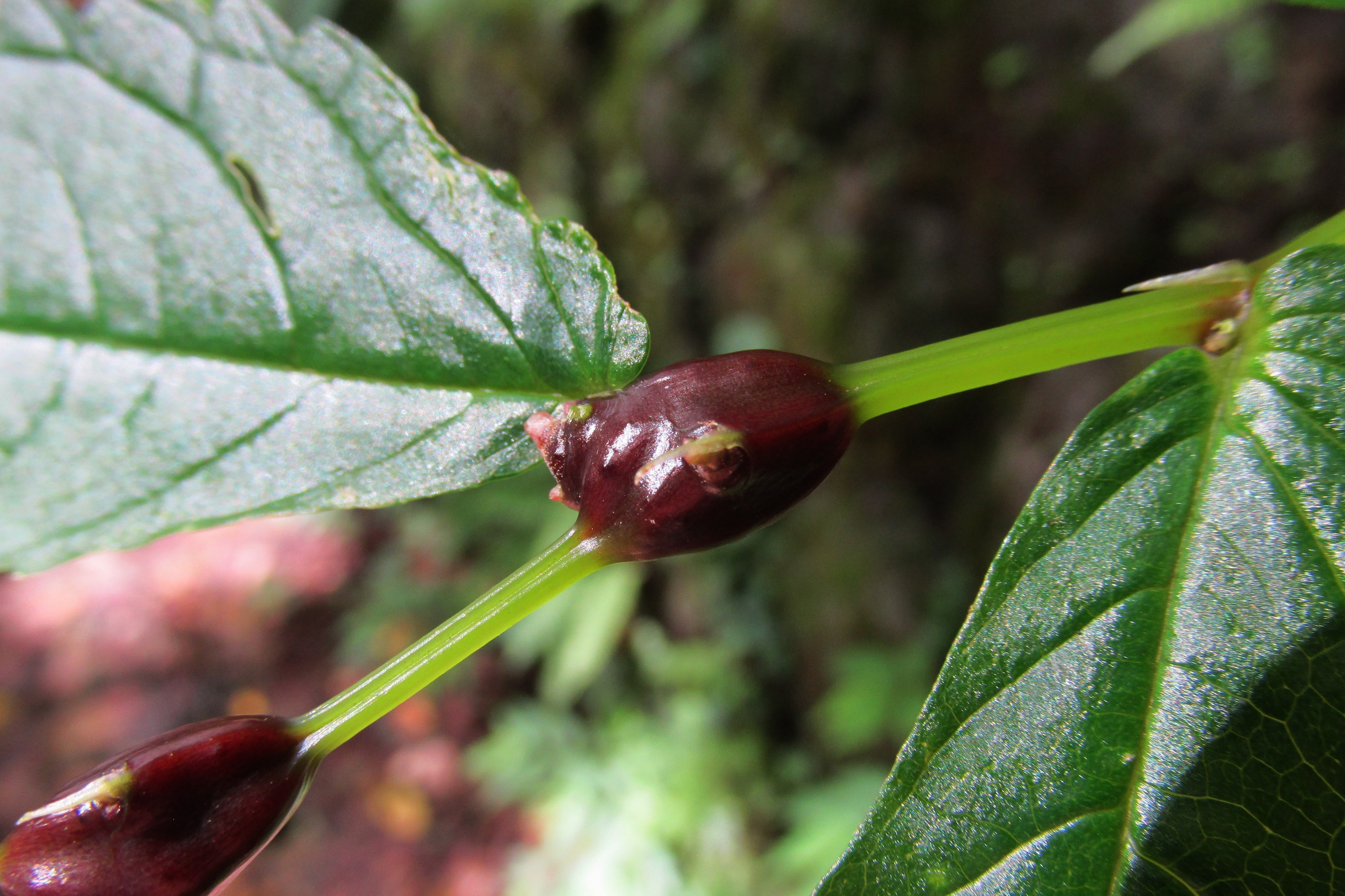 E.umbellatum(JP_Uwabamisou)